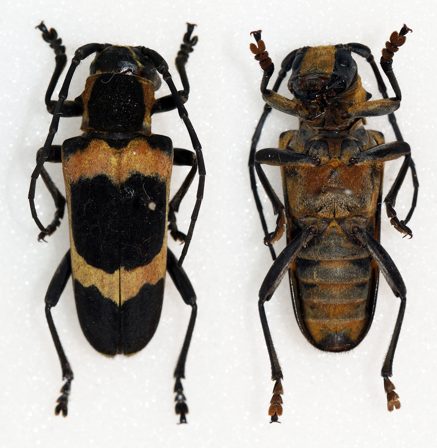 Hua,1990 Sex: Female Data: 06-2014 - Ha Giang - Vietnam Size: 24mm